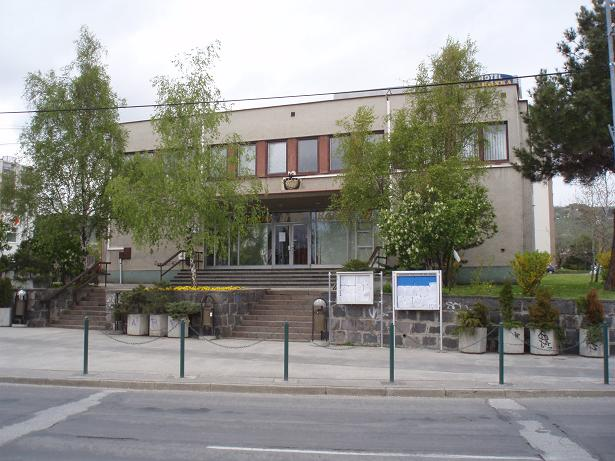 Miestny úrad v Rači